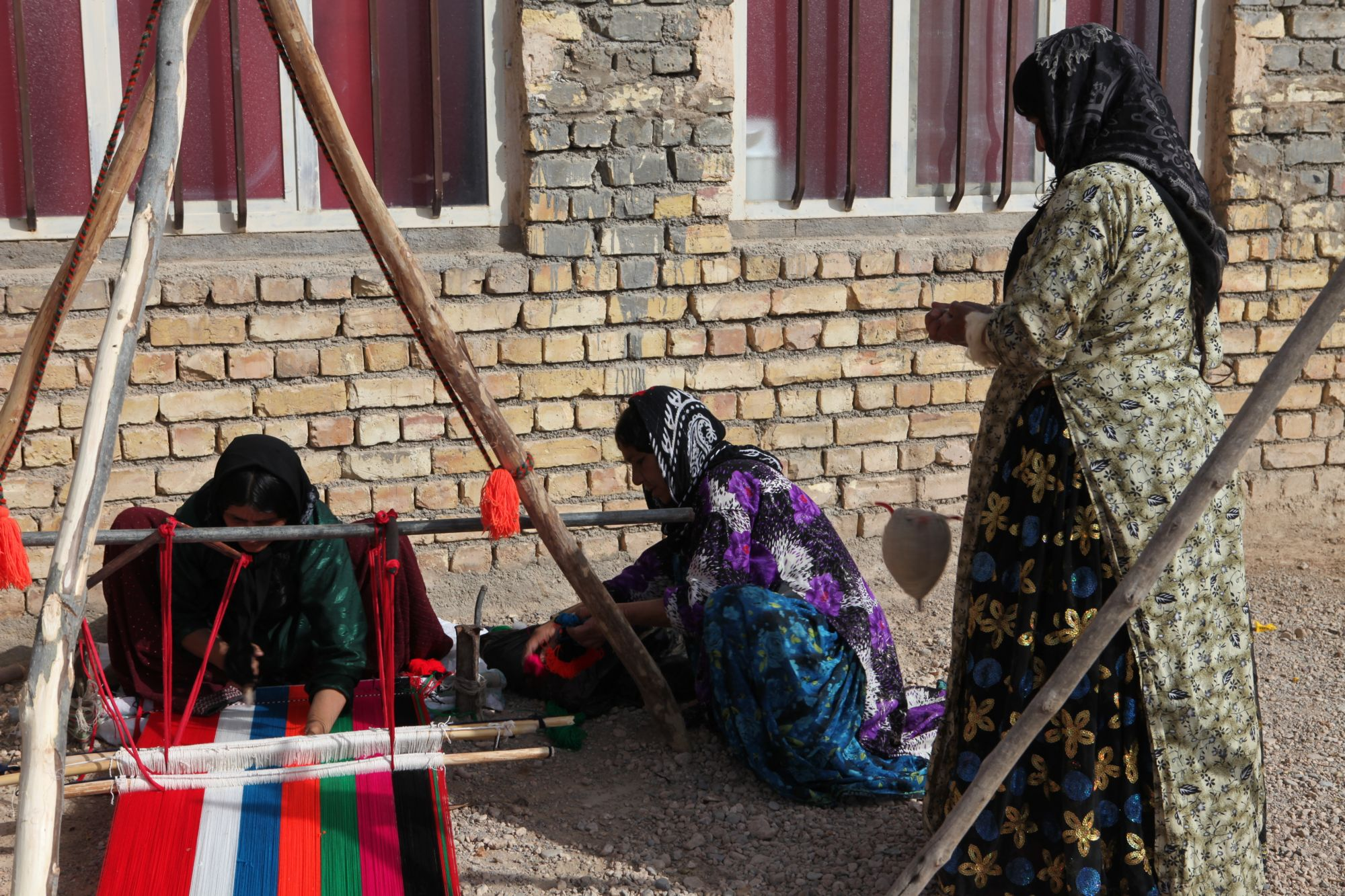 زنان قشقایی در حال بافت یک جاجیم در سمیرم اصفهان.